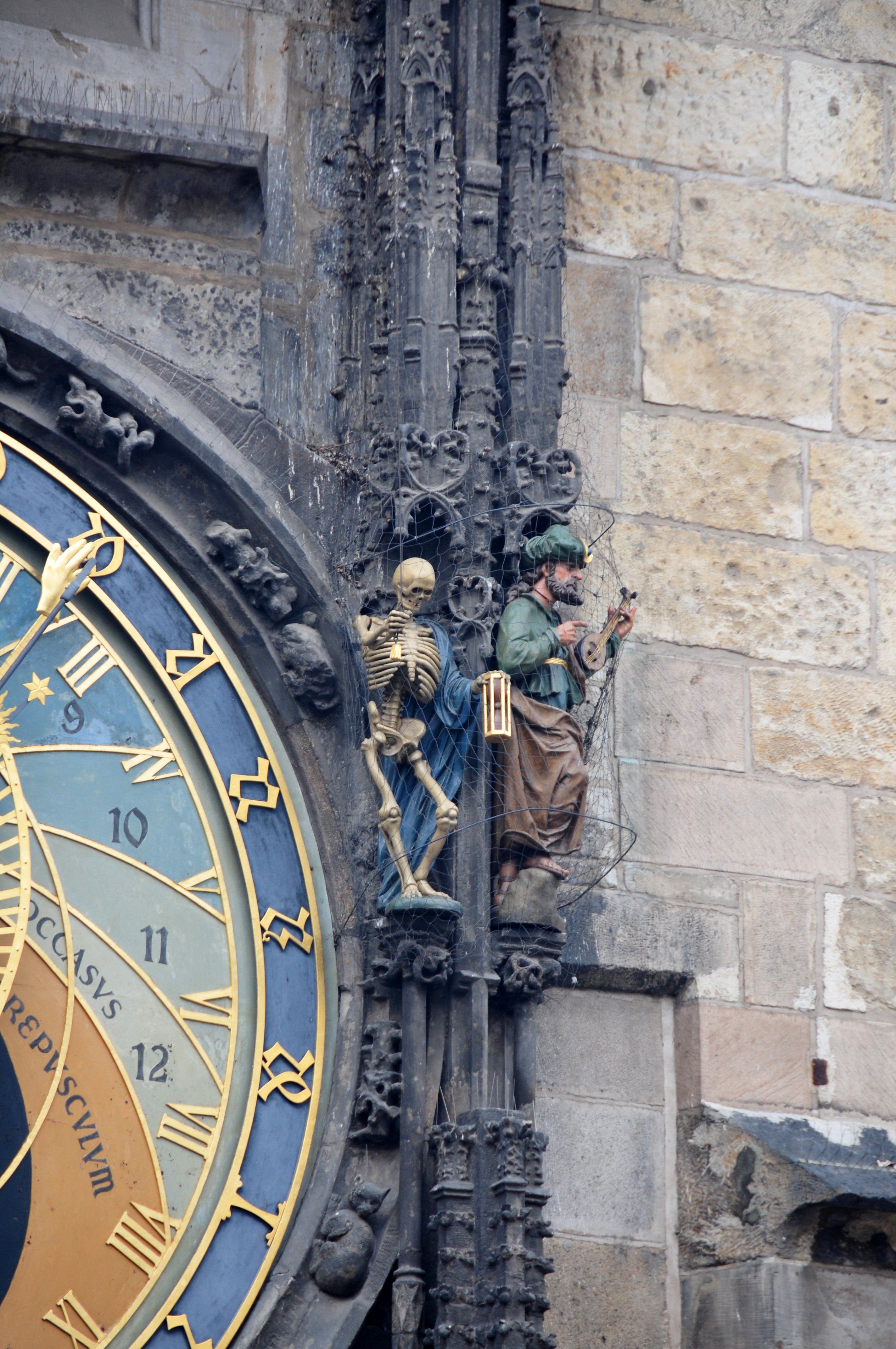 Prag